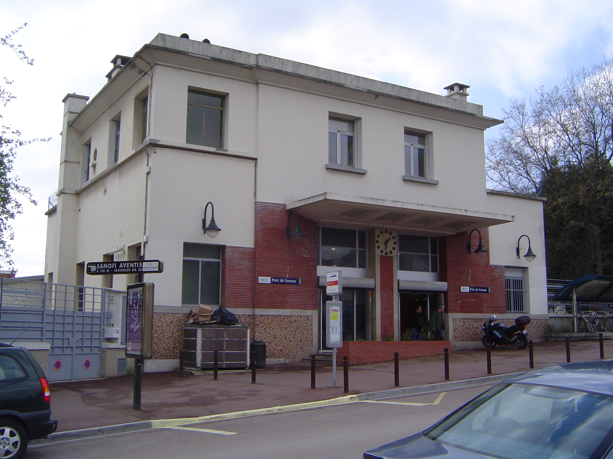 Photo de la gare du RER "Parc de Sceaux"